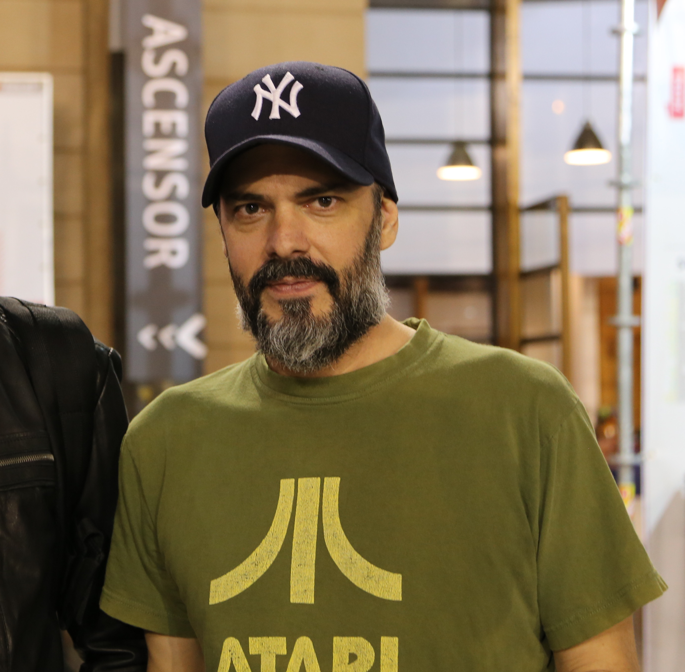 El escritor Mike Wilson en 2014